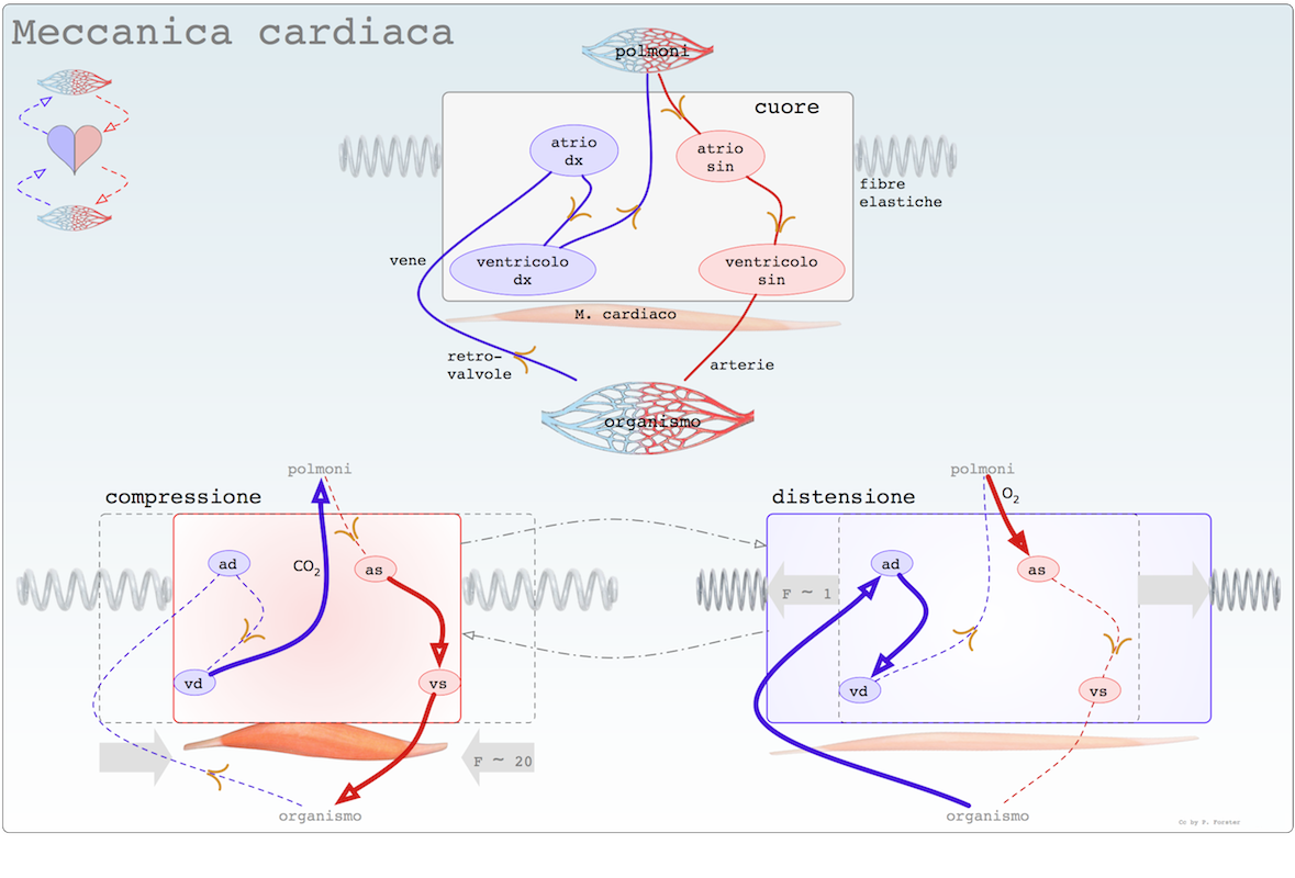 contrazione ed espansione cardiaca, circolazione sanguigna cardiaca, arteriosa, venosa, capillare